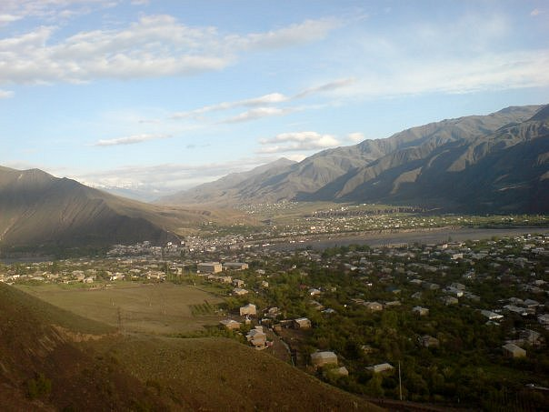 Это панорама села Ахты в Дагестане